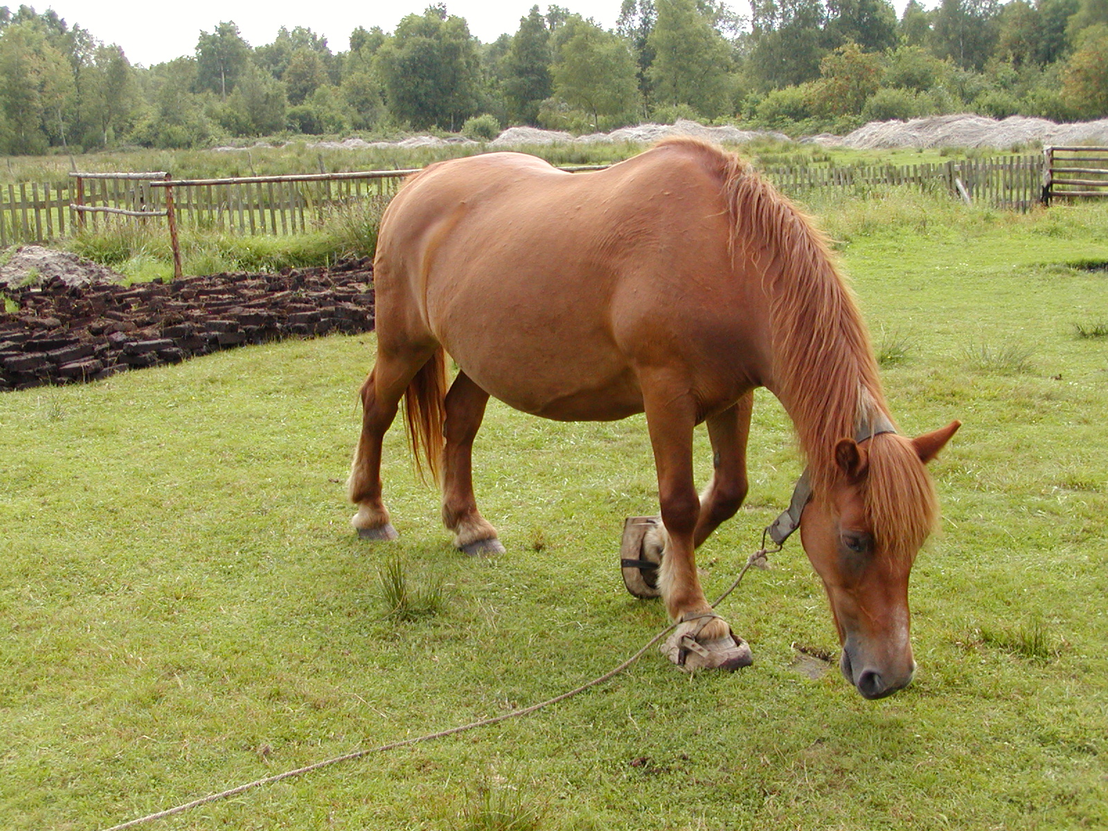 Kluki, Poland Muzeum Wsi Słowińskiej, koń w klumpach